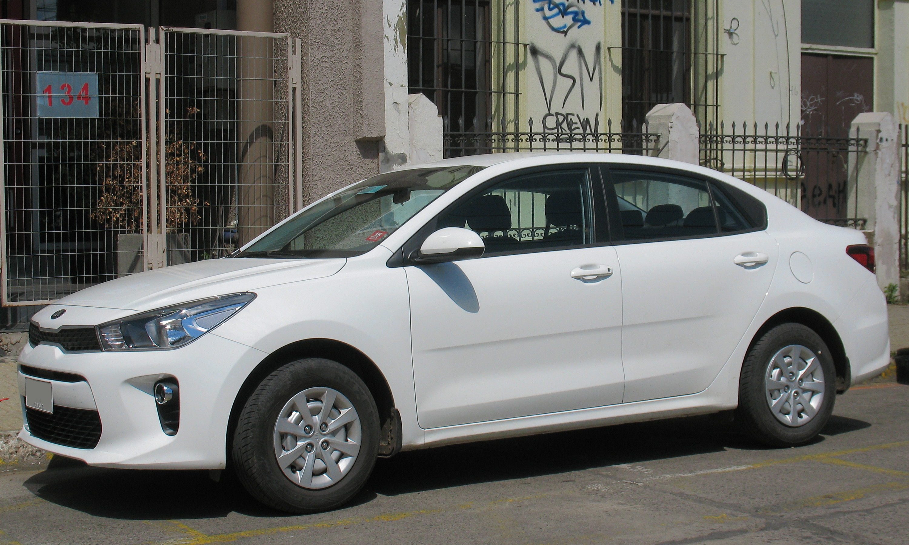 Kia Rio4 1.4 LX 2018